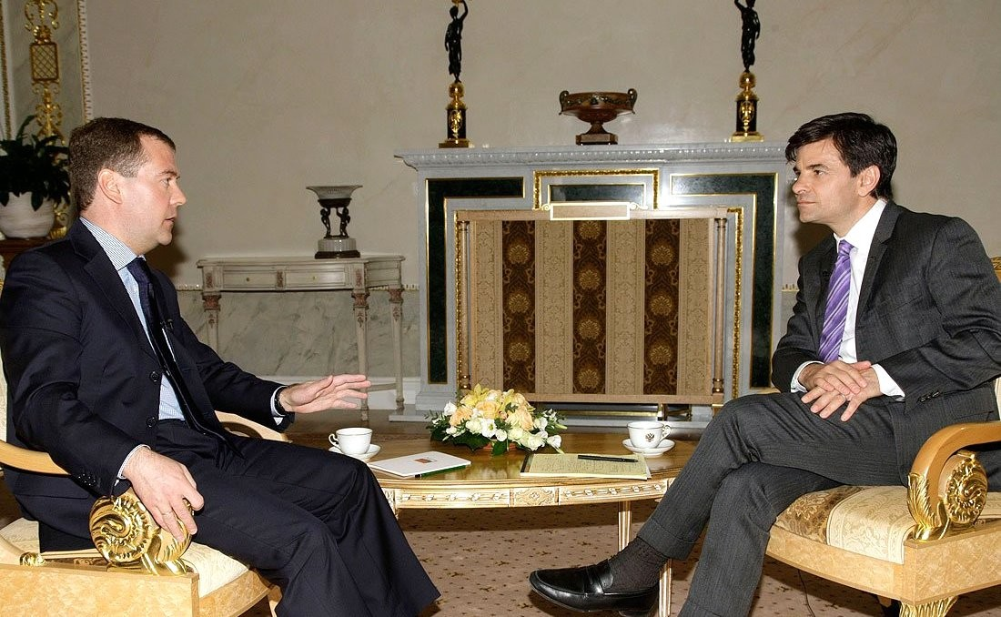 Дмитрий Медведев, Джордж Стефанопулос